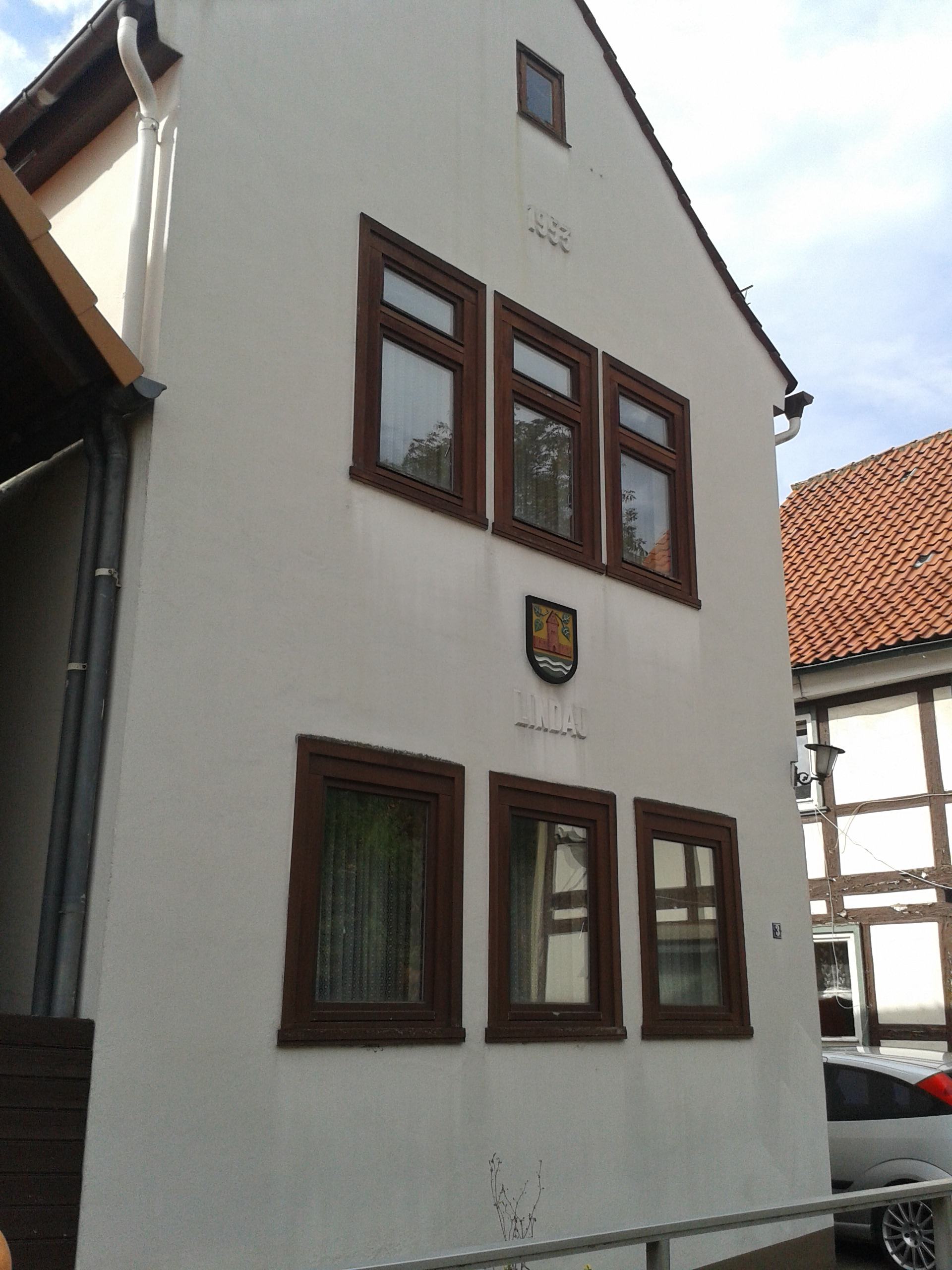 Das Gebäude der ehemaligen Gemeindeverwaltung von Lindau.